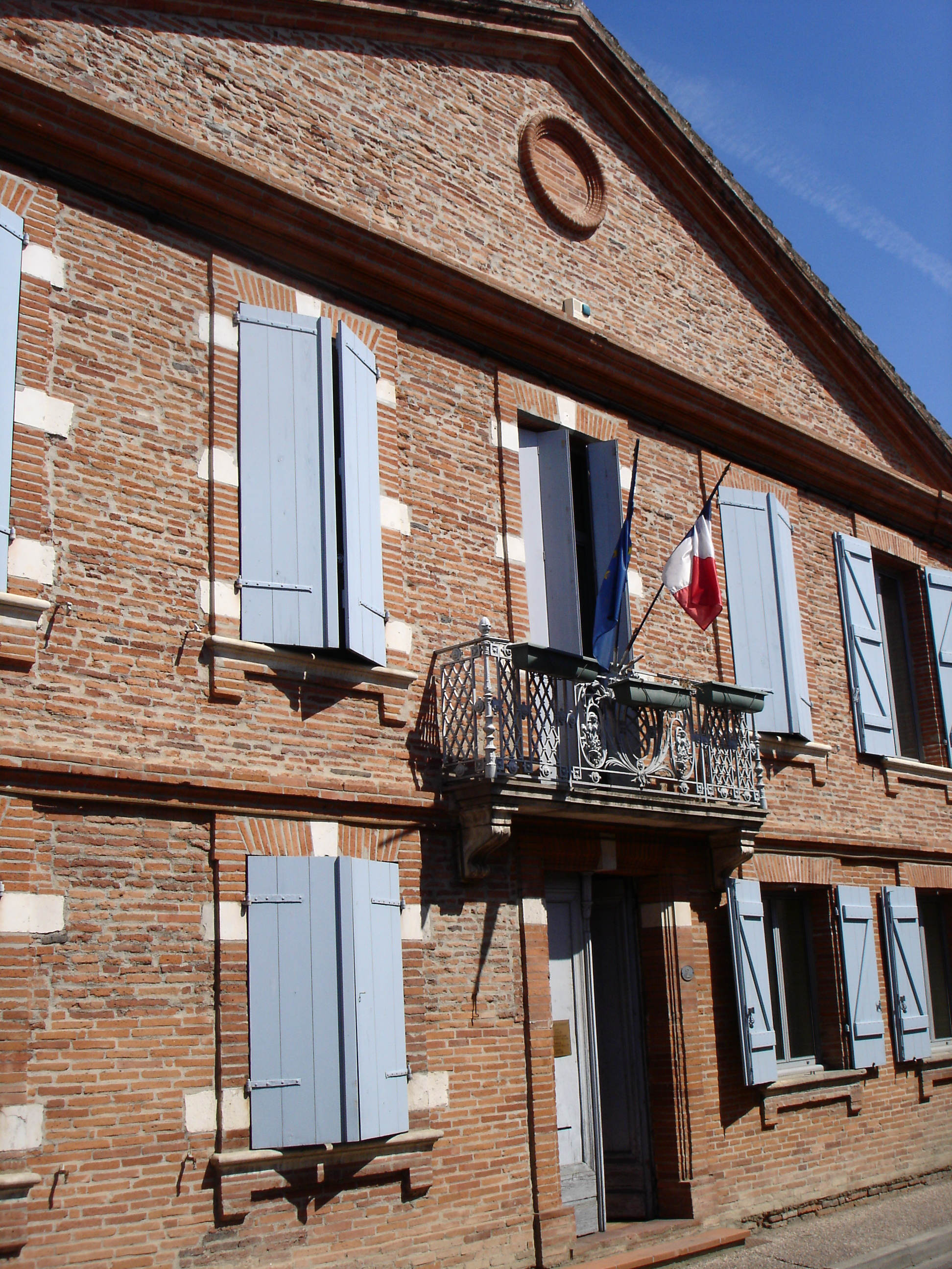 Mairie de Lherm